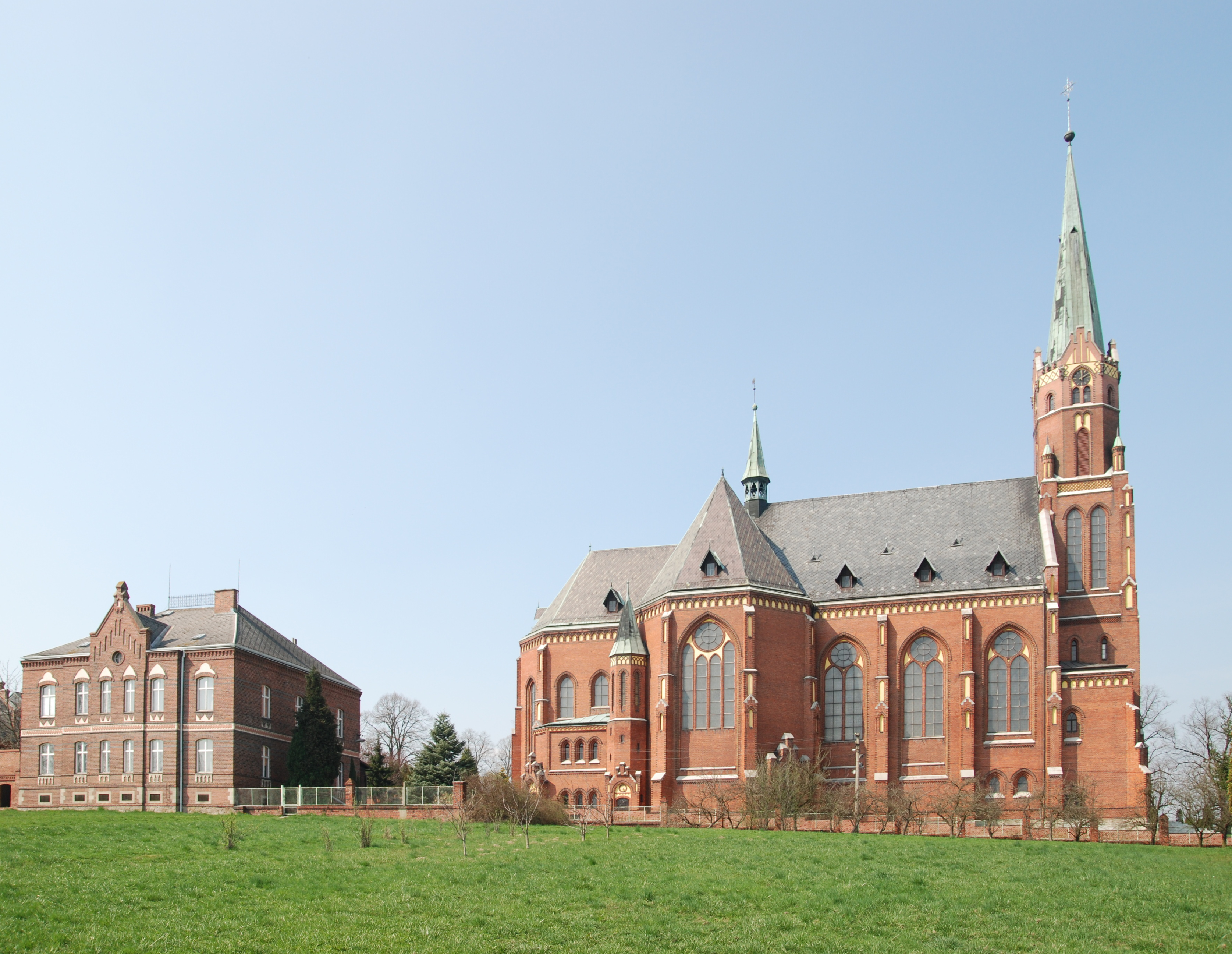 Kostel svatého Mikuláše, Markvartovická, Hlučínská, Ludgeřovice.